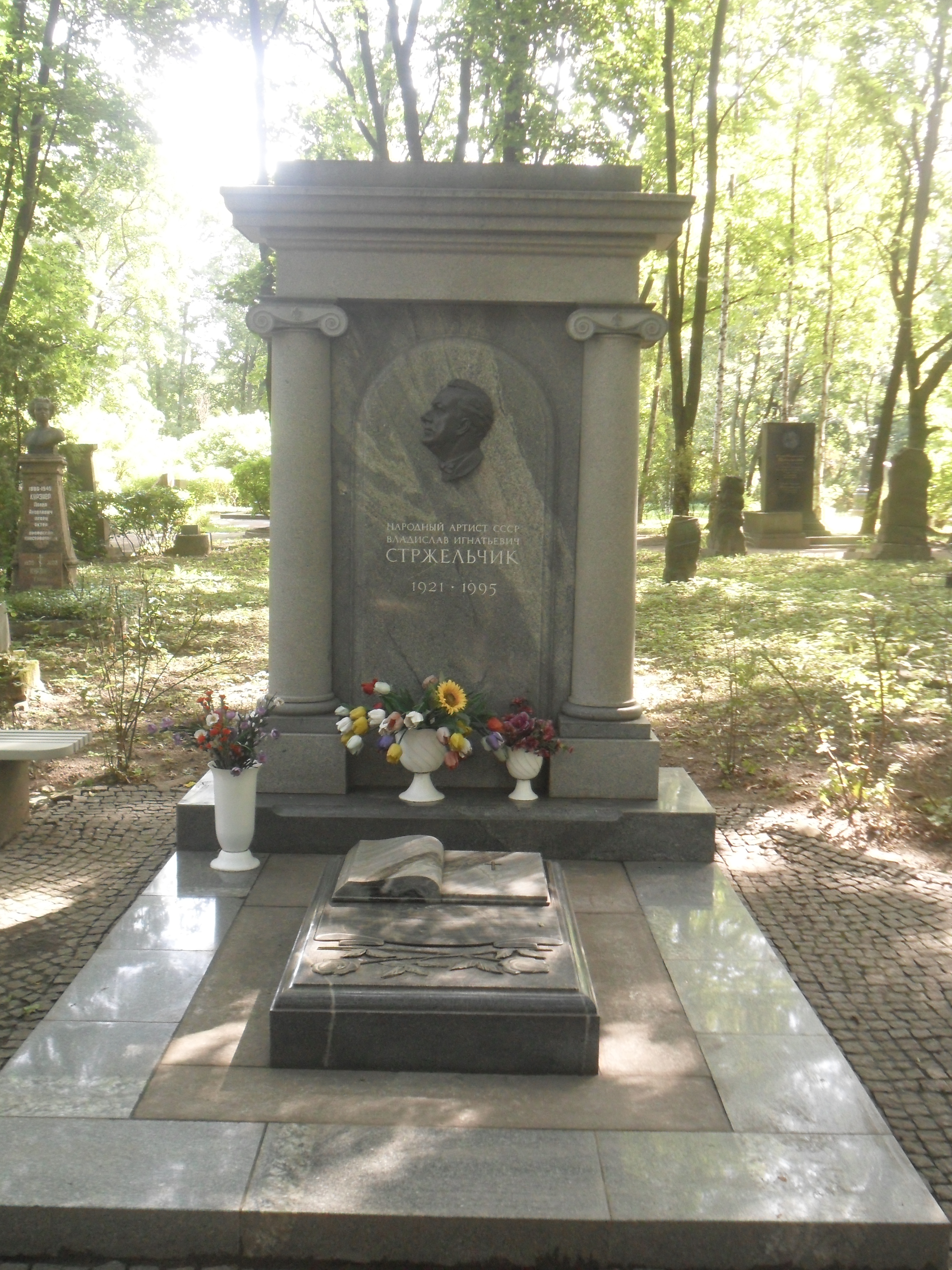 Могила артиста Владислава Стржельчика на Литераторских мостках в Санкт-Петербурге.